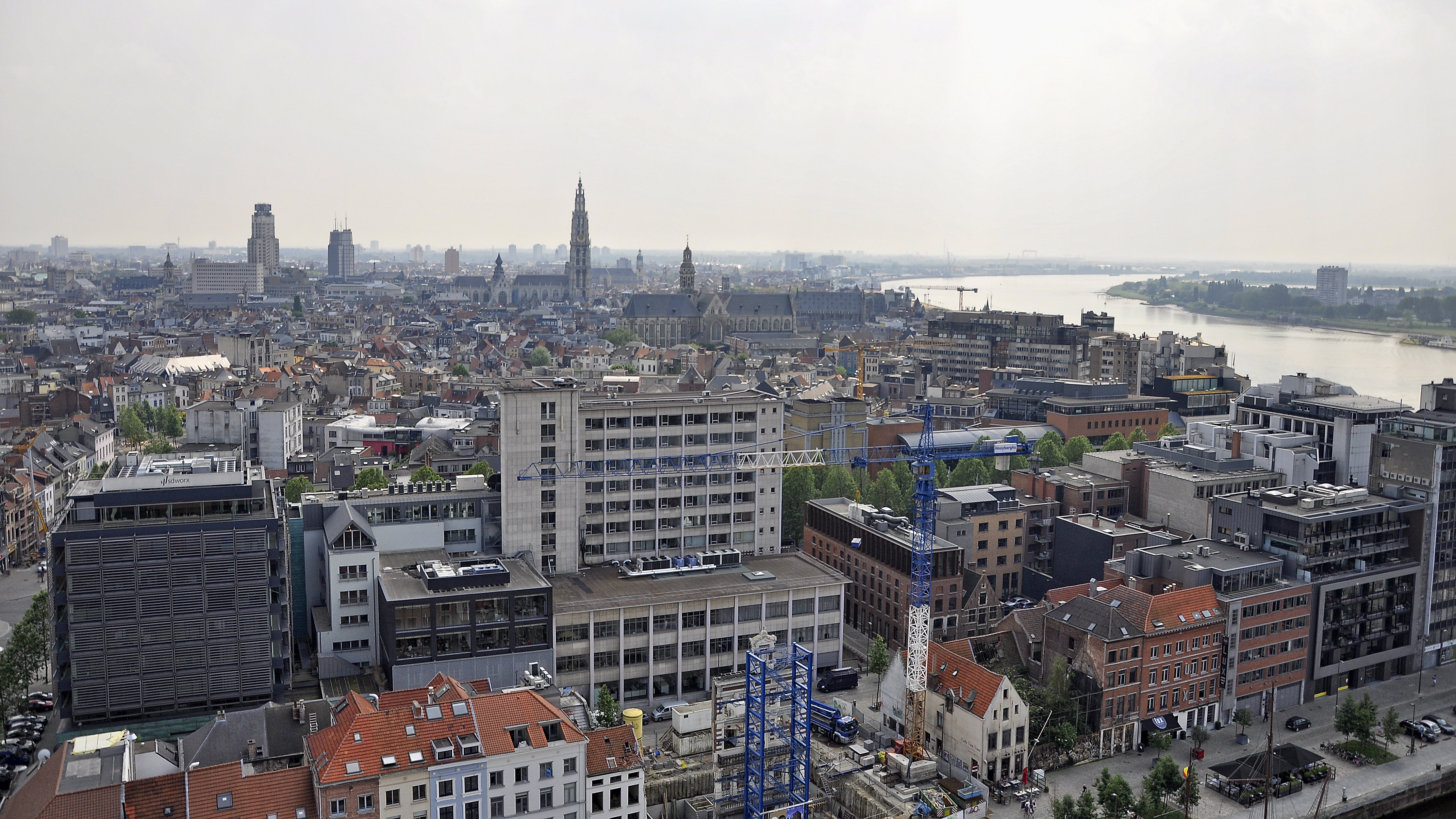 Stadsgezicht van Antwerpen vanaf het Museum aan de Stroom